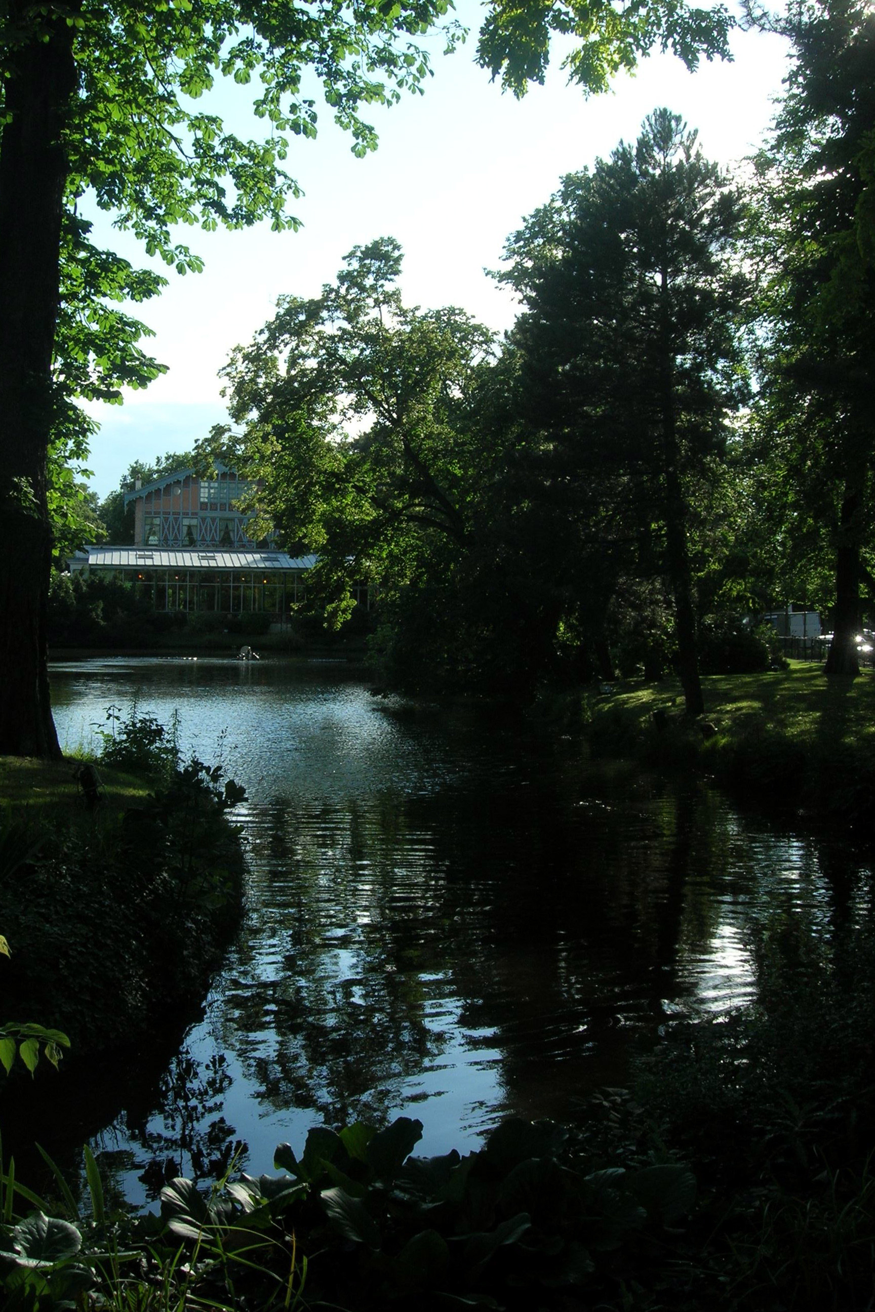 Pavillon Armenonville